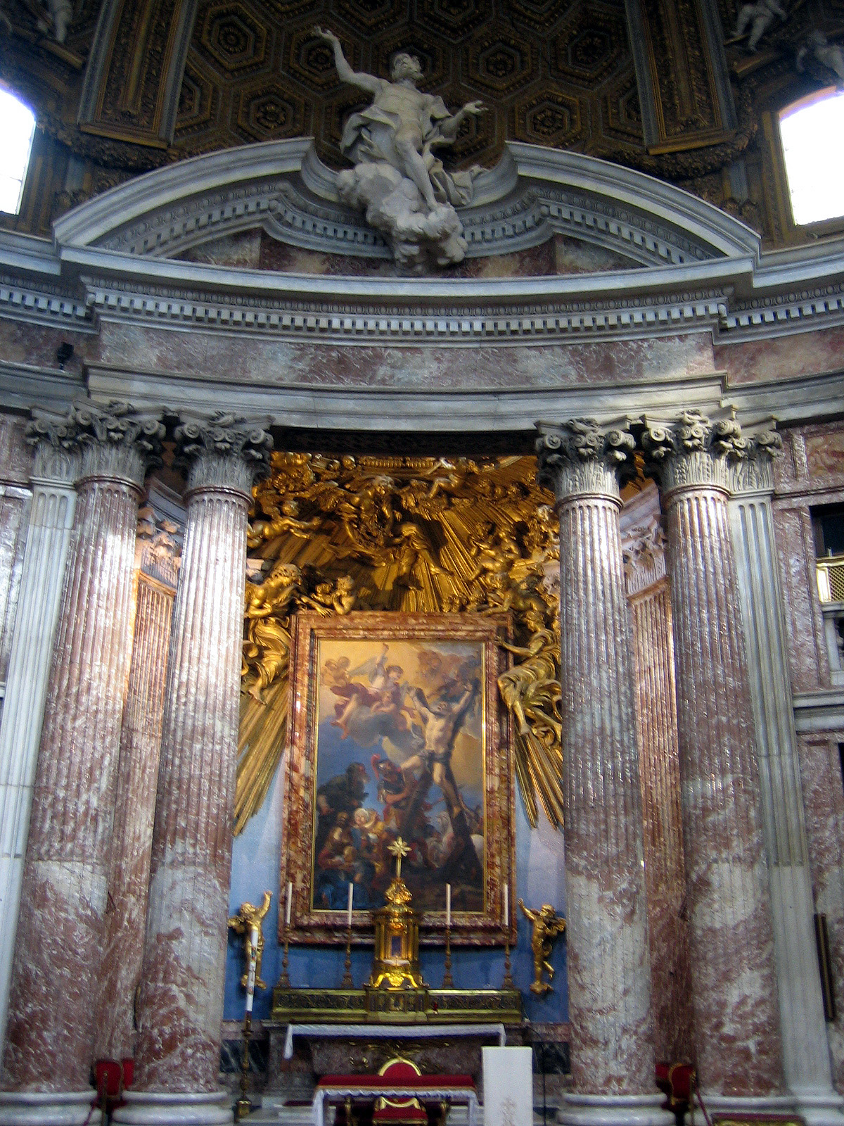 High altar, Sant'Andrea al Quirinale, Roma